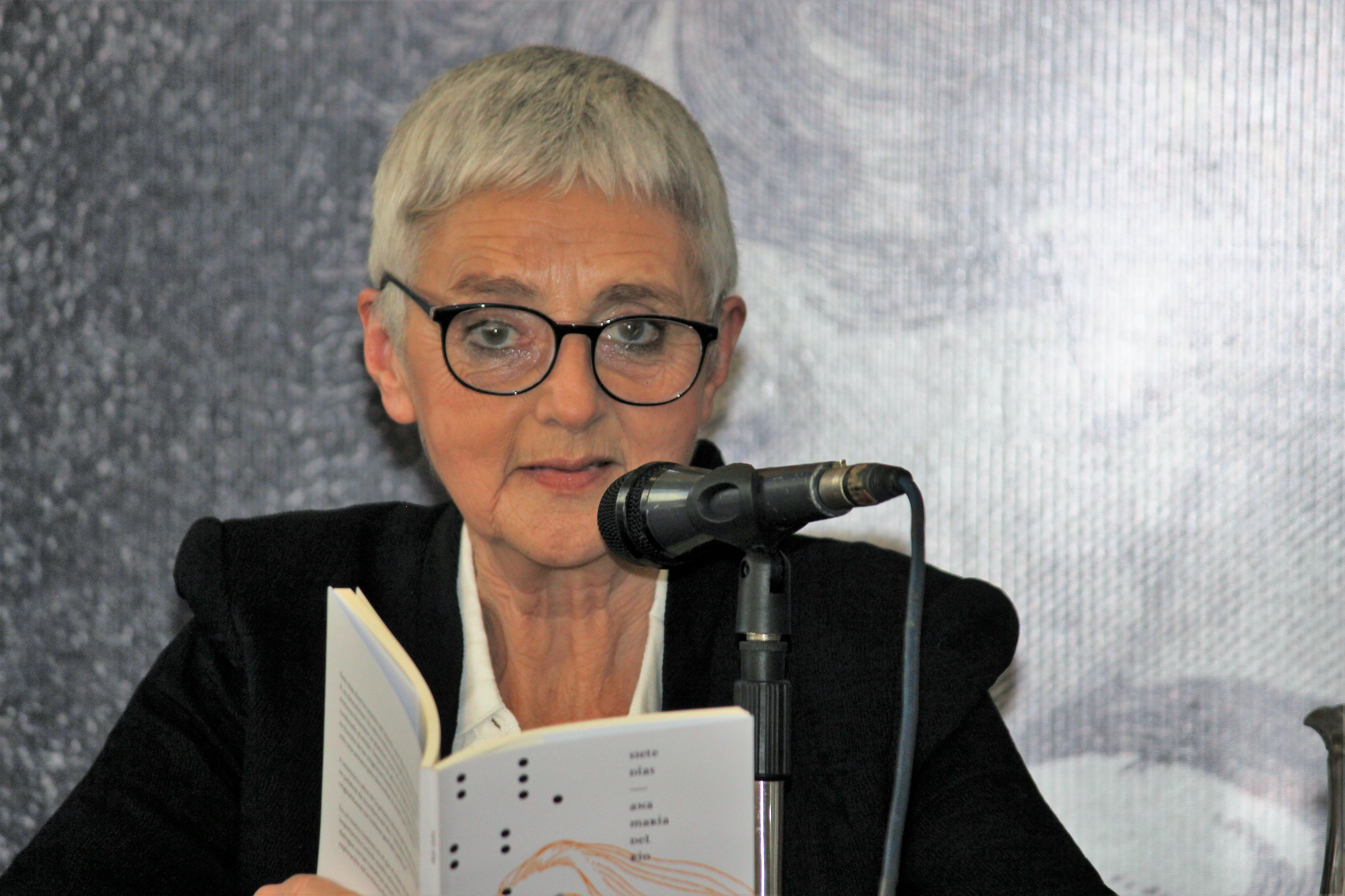 La escritora chilena Ana María del Río durante la presentación de su novela Siete días (reedición corregida de Siete días de la señora K) realizada en la Feria Internacional del Libro de Santiago 2018 (sala Acario Cotapos, 7 de noviembre).